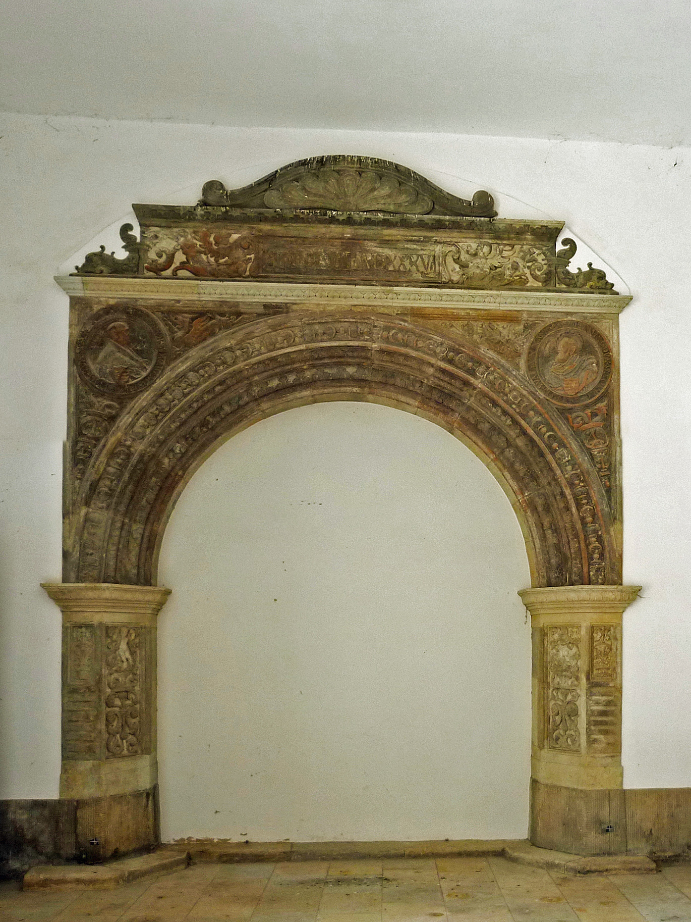 Spolien von zwei Portalen der Renaissance ehemals auf der Südseite des Georgentors des Dresdner Residenzschlosses (1535). Der Bogen oben stammt von dem westlichen Tor, die Seitenpfeiler von dem östlichen Tor. Die Bauornamentik wird Christoph Walther I zugeschrieben (heute zu sehen im Durchgang zum Jagdtor im Stallhof). Literatur: Landesamt für Denkmalpflege Sachsen (Hrsg.): Das Residenzschloss zu Dresden. Band 1: Von der mittelalterlichen Burg zur Schlossanlage der Spätgotik und Frührenaissance. Petersberg 2013.